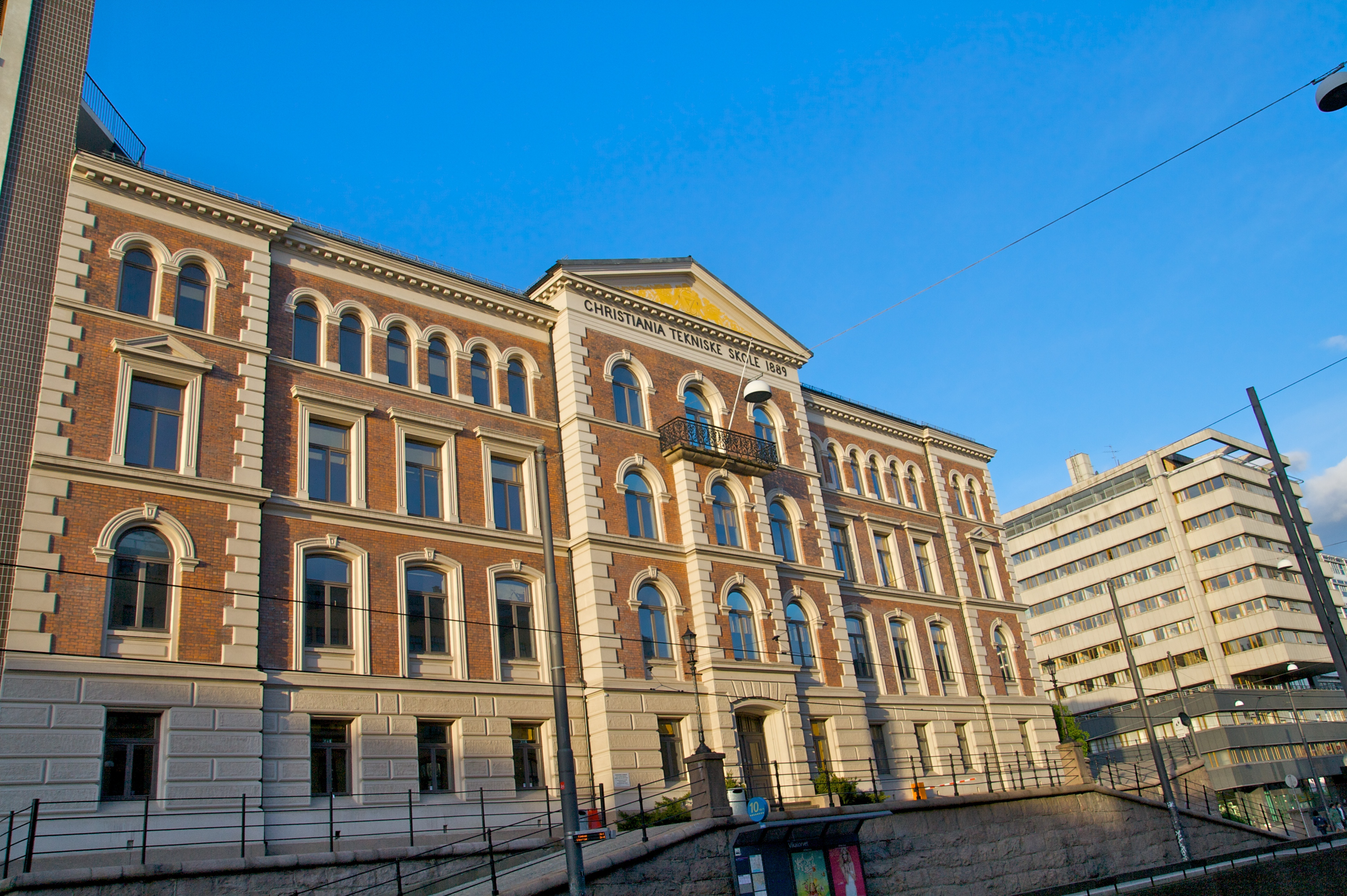 Christiania Tekniske Skole, Ruseløkka i Oslo.